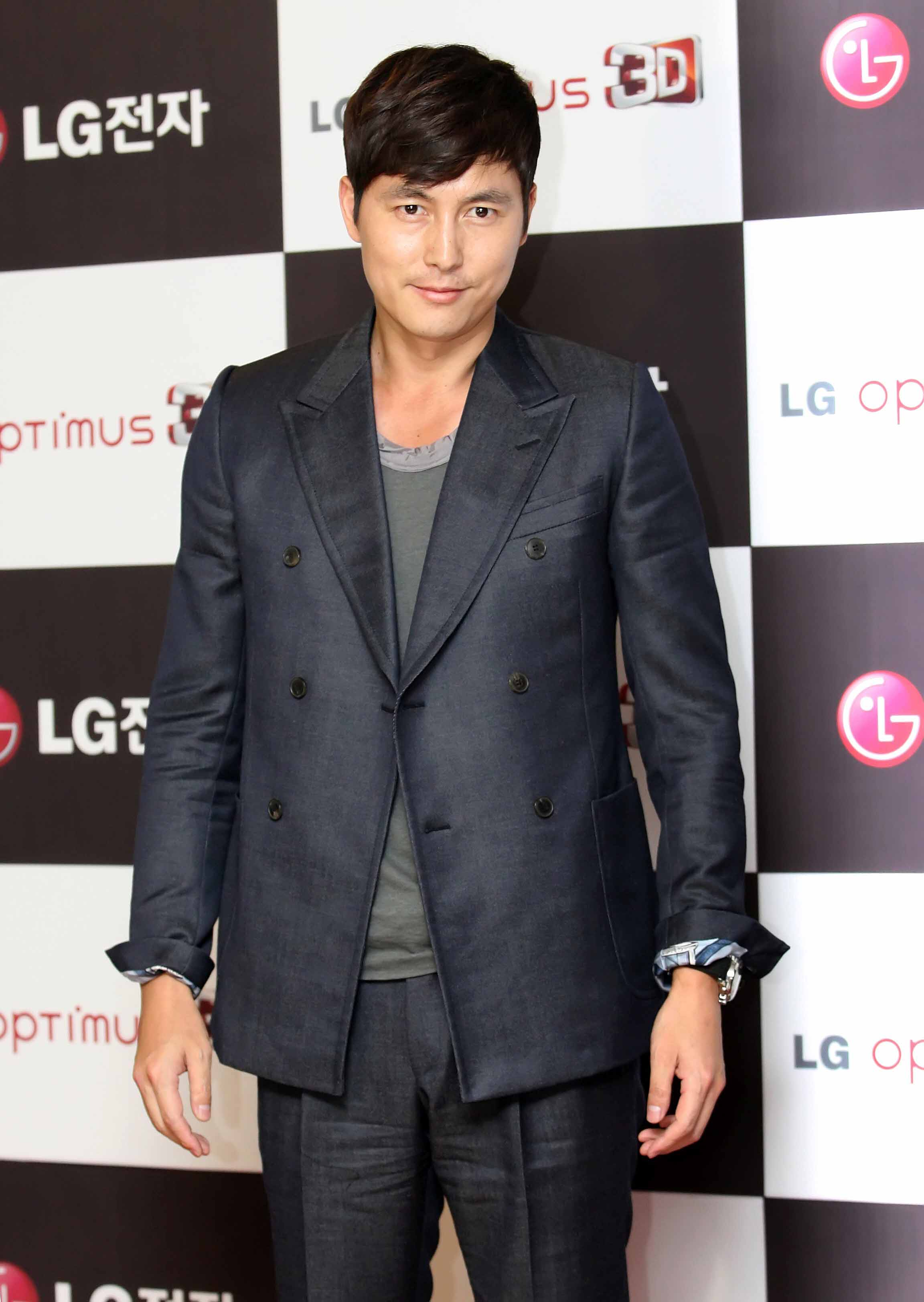 LG전자‘옵티머스3D’와 ‘트랜스포머 3’가 만났다. 6월 28일 저녁 상암 CGV에서 열린 ‘옵티머스 3D와 함께하는 트랜스포머3 시사회'에 참석한 정우성. ※ LG전자 뉴스룸 에서 관련 보도자료를 확인실 수 있습니다.